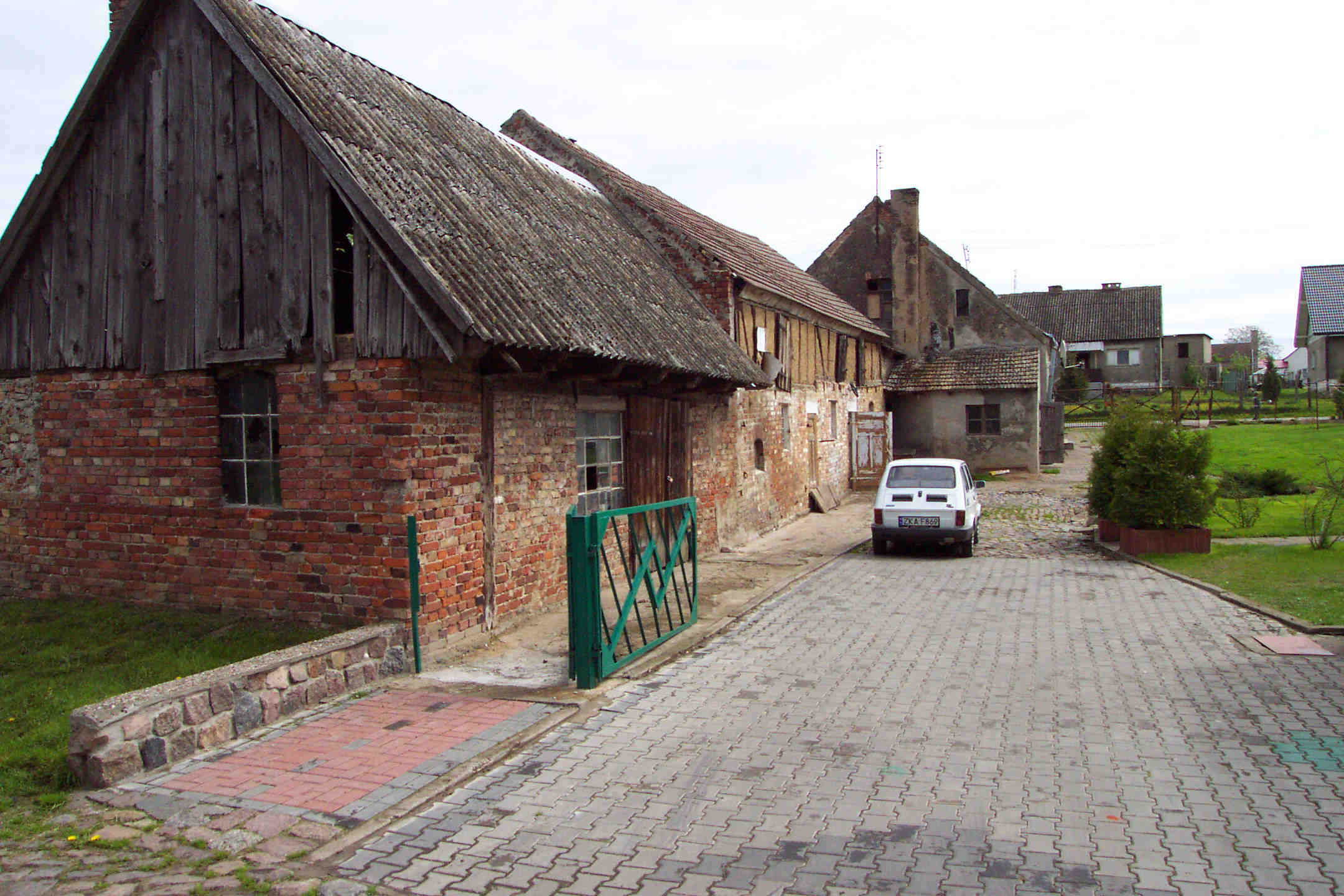 budynek byłej kuźni w Trzebieszewie. Obecnie rozebrany. Teren posesji pp. Bajda.